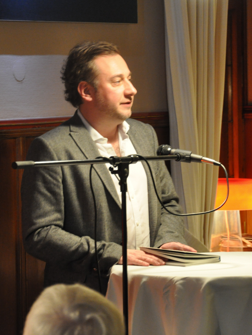 Schriftsteller und Foodblogger Stevan Paul bei einer Lesung im Rahmen des Festivals "Wortmenue" Überlingen